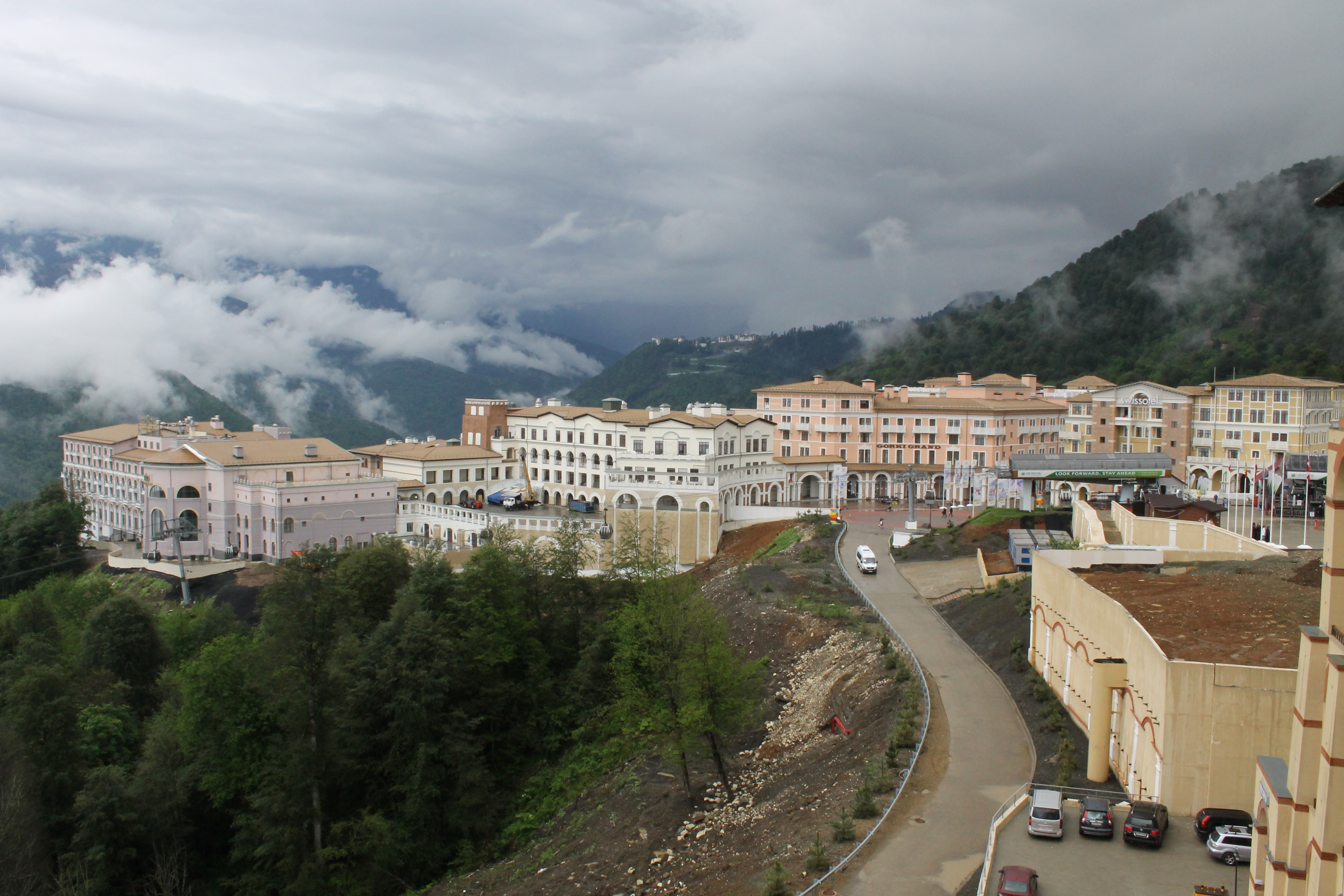 Комплекс Горная карусель. Верхний Горки город, на высоте 960 м.